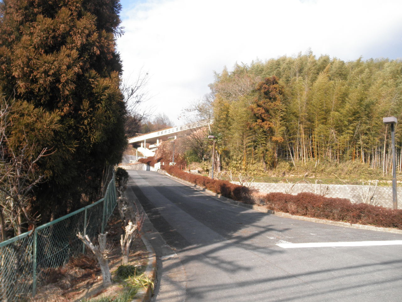 京都府立山城郷土資料館